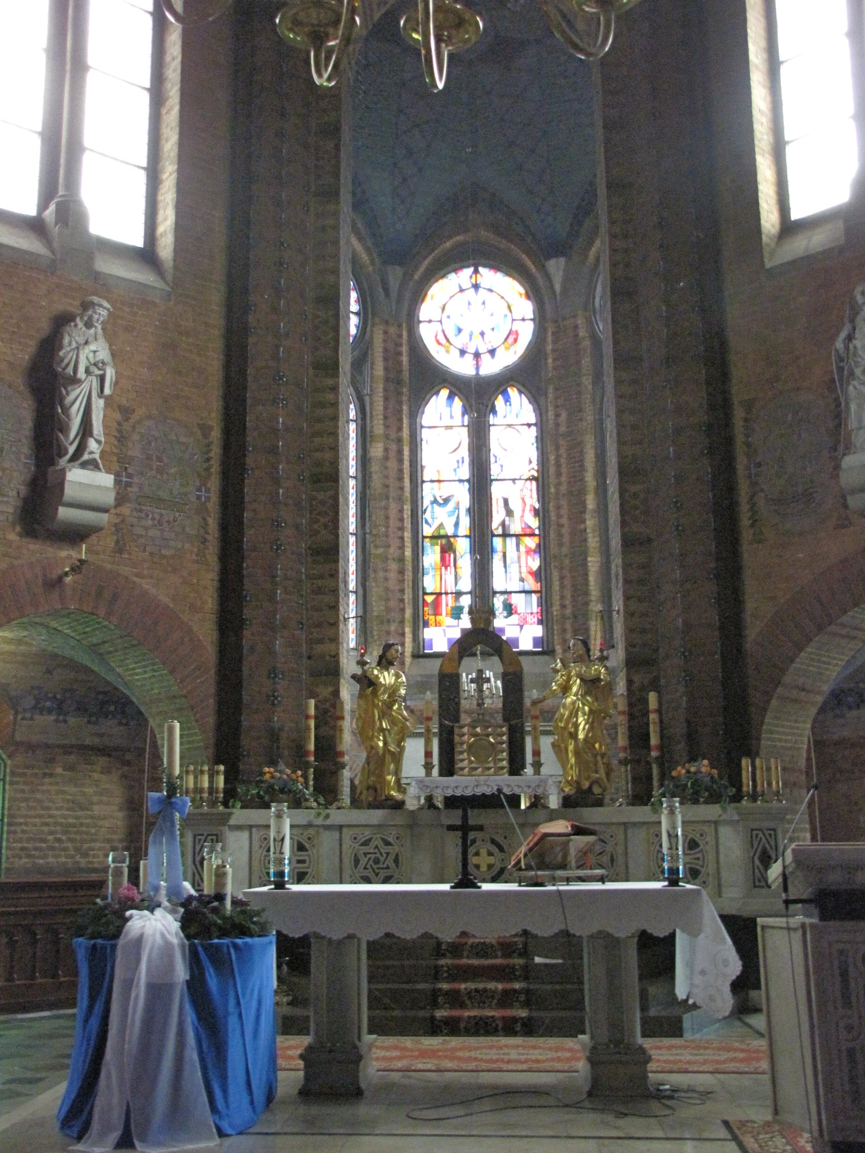 Kościół Nawiedzenia NMP w Suchej Beskidzkiej